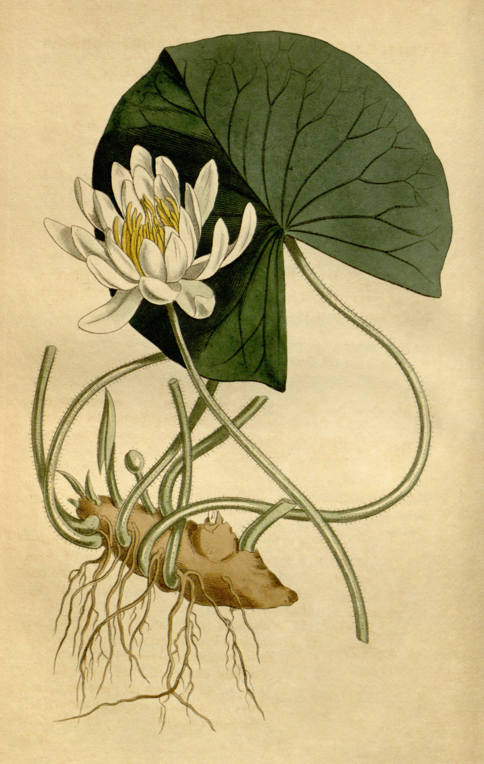 Nymphaea odorata subsp. odorata